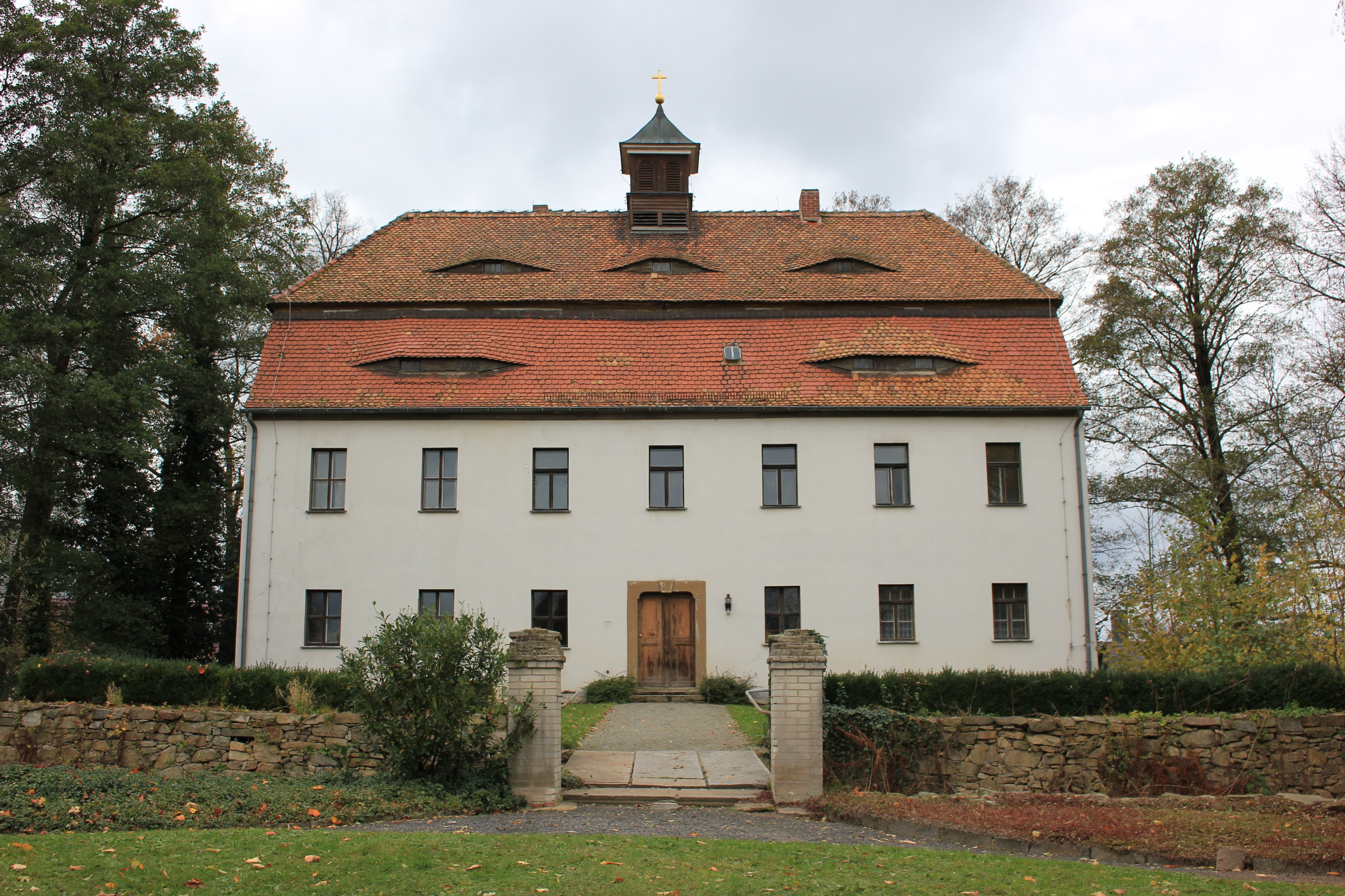 Hornjoserbsce: Knježi dwór w Zdźěri.